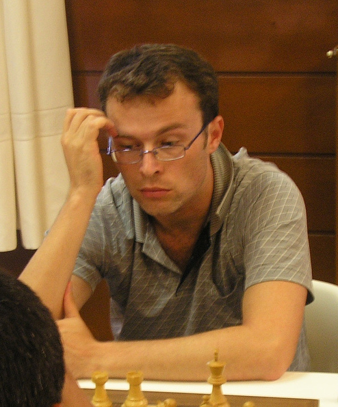 GM Artur Kogan (Israel)